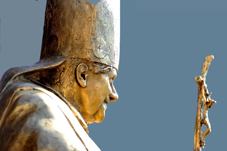 Bronzestatue an der Wand des Kongrationssaales auf dem Kapellplatz in Altötting